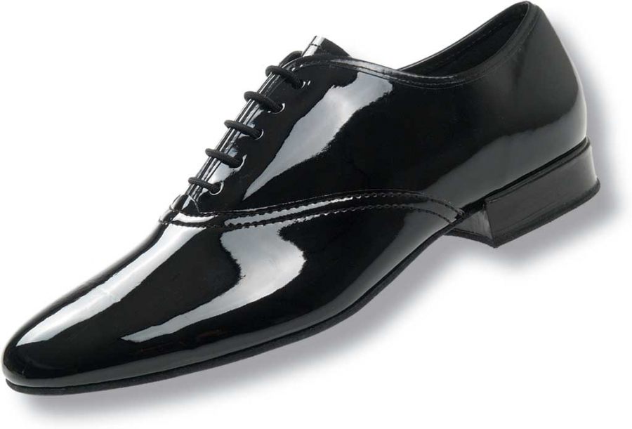 ArtNr. 078-075-038 Mod. 078 Herrenschuh Weite G Normalweite Absatz 2,5 cm schwarz Lack Synth.